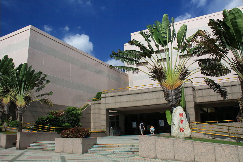 國立彰化師範大學體育館